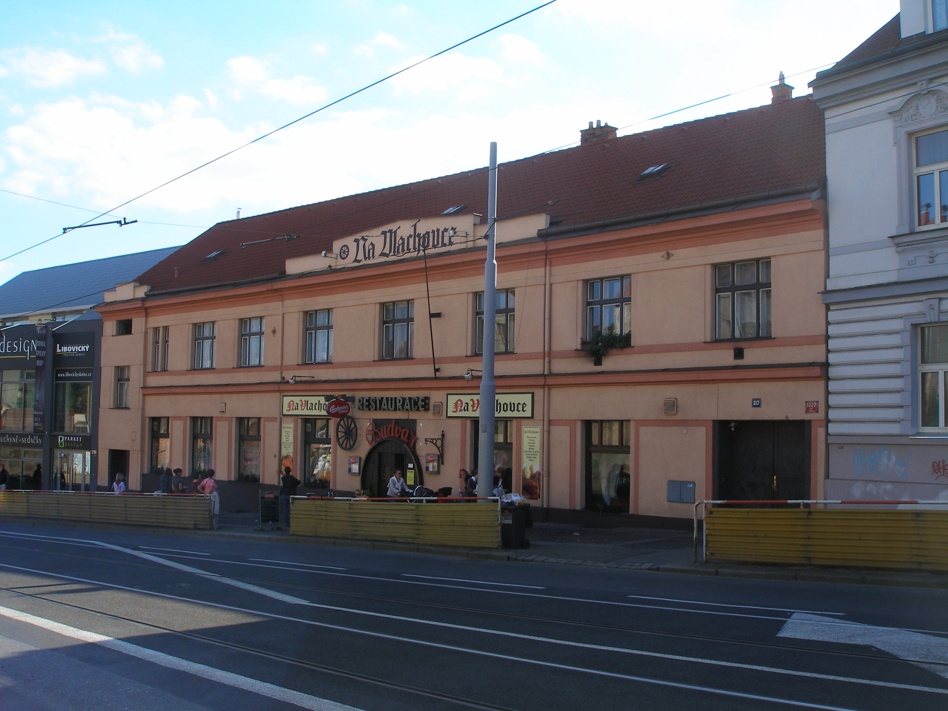 Restaurace Na Vlachovce v Praze (pohled ze severu ze Zenklovy ulice). Dům číslo 1327/217 v Zenkklově ulici v Praze 8.